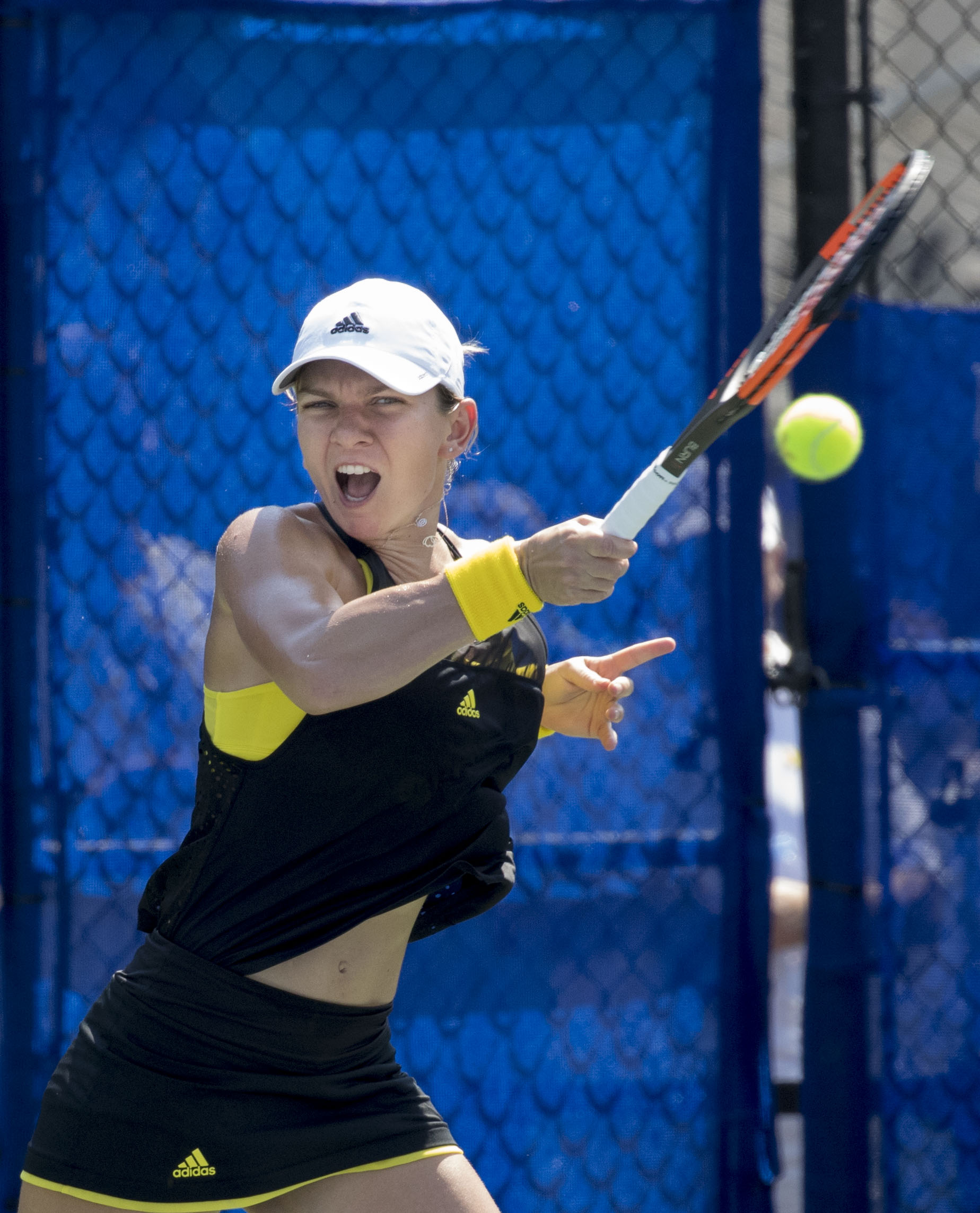 Citi Open Tennis 2017